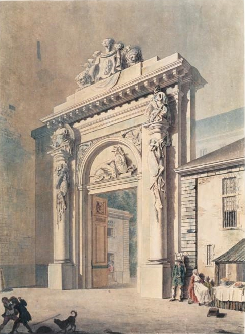 Porte de l'hôtel d'Uzès à Paris, rue Montmartre, œuvre de Claude Nicolas Ledoux (1736-1806). Dessin à la plume et lavis à l'encre de Chine teinté d'aquarelle, 48,2 x 35,7 cm, en provenance de la collection Hippolyte Destailleur.